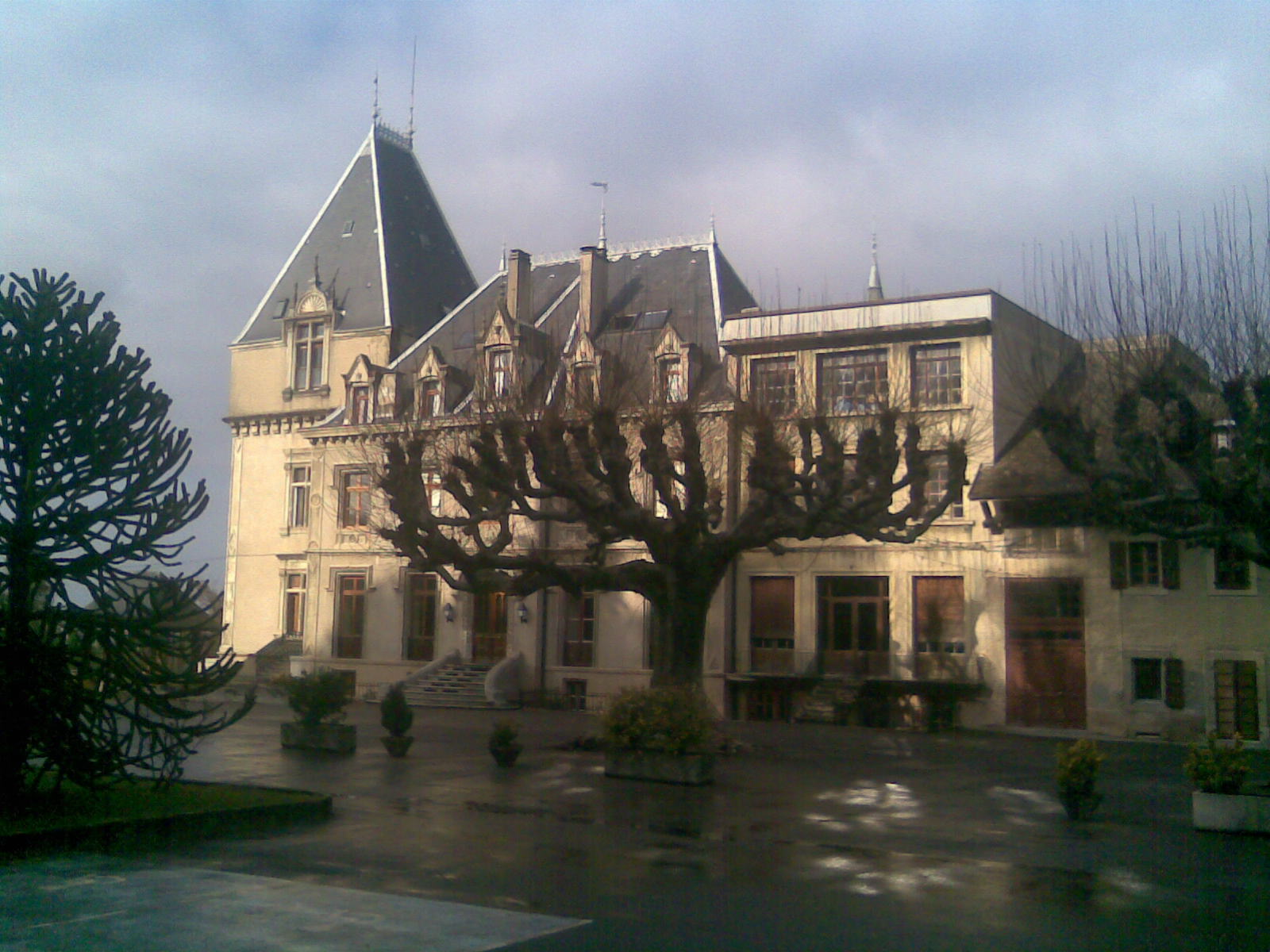 Le chateau de Blonay à Publier.